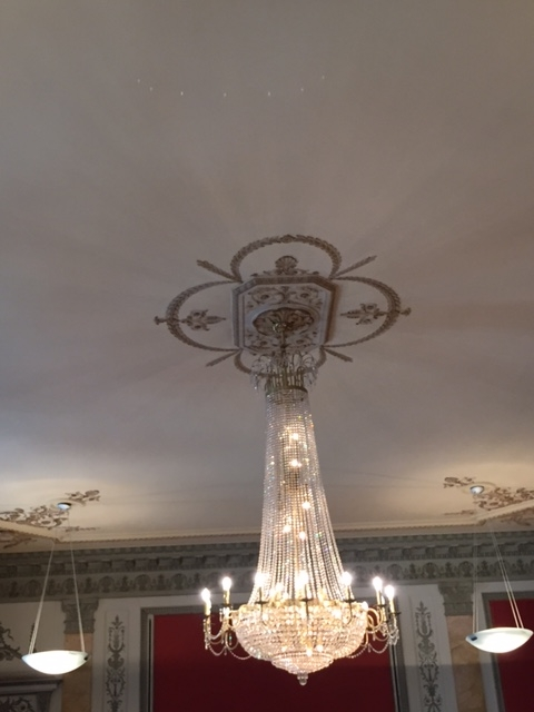 Decoracion interior del palacio